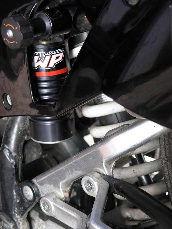 WP Suspension unit